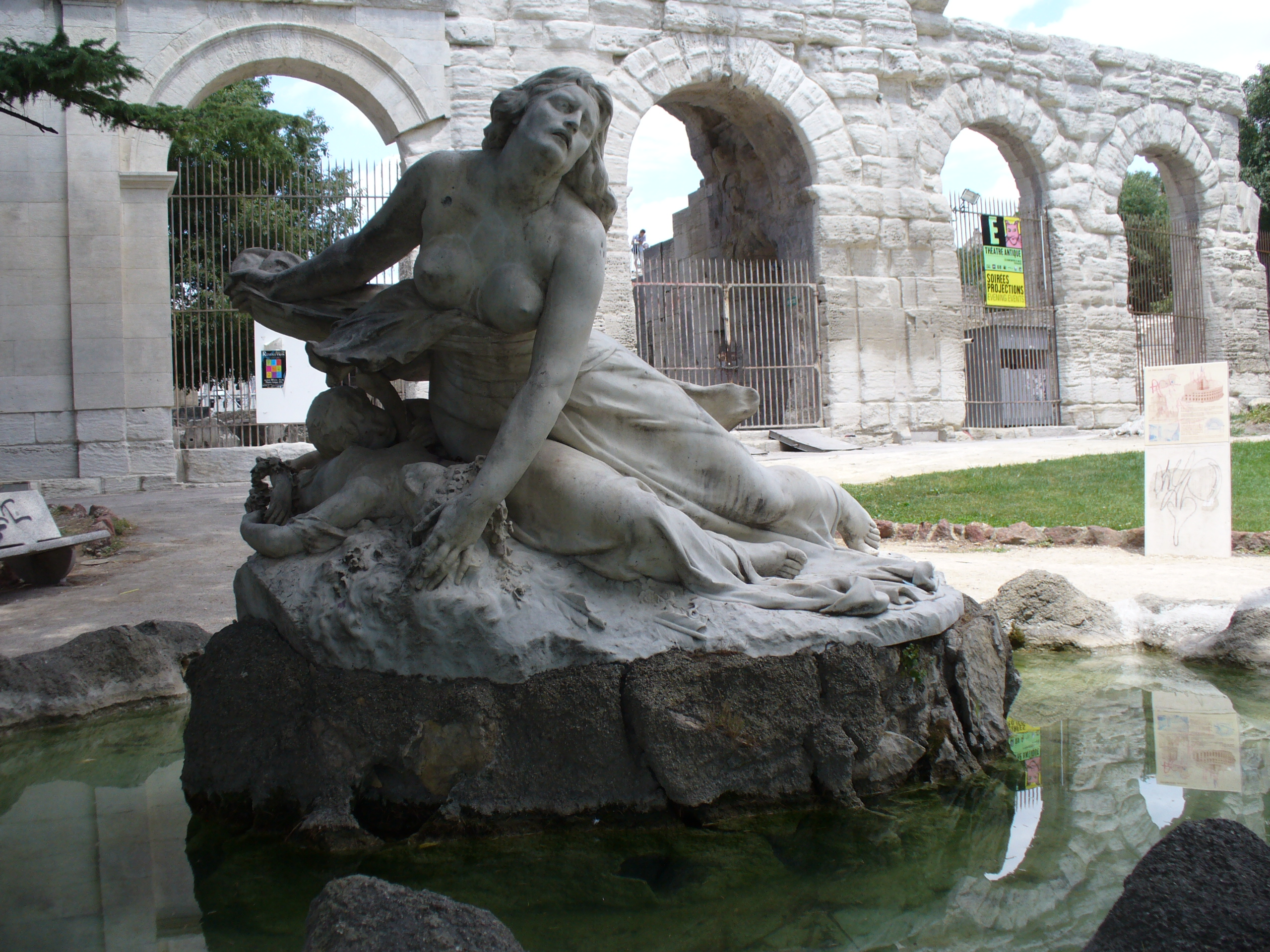 Arles-Provence-Skulpturenbrunnen-vor dem römischen Theater-Zu Zeiten des römischen Kaisers Augustus errichtet.